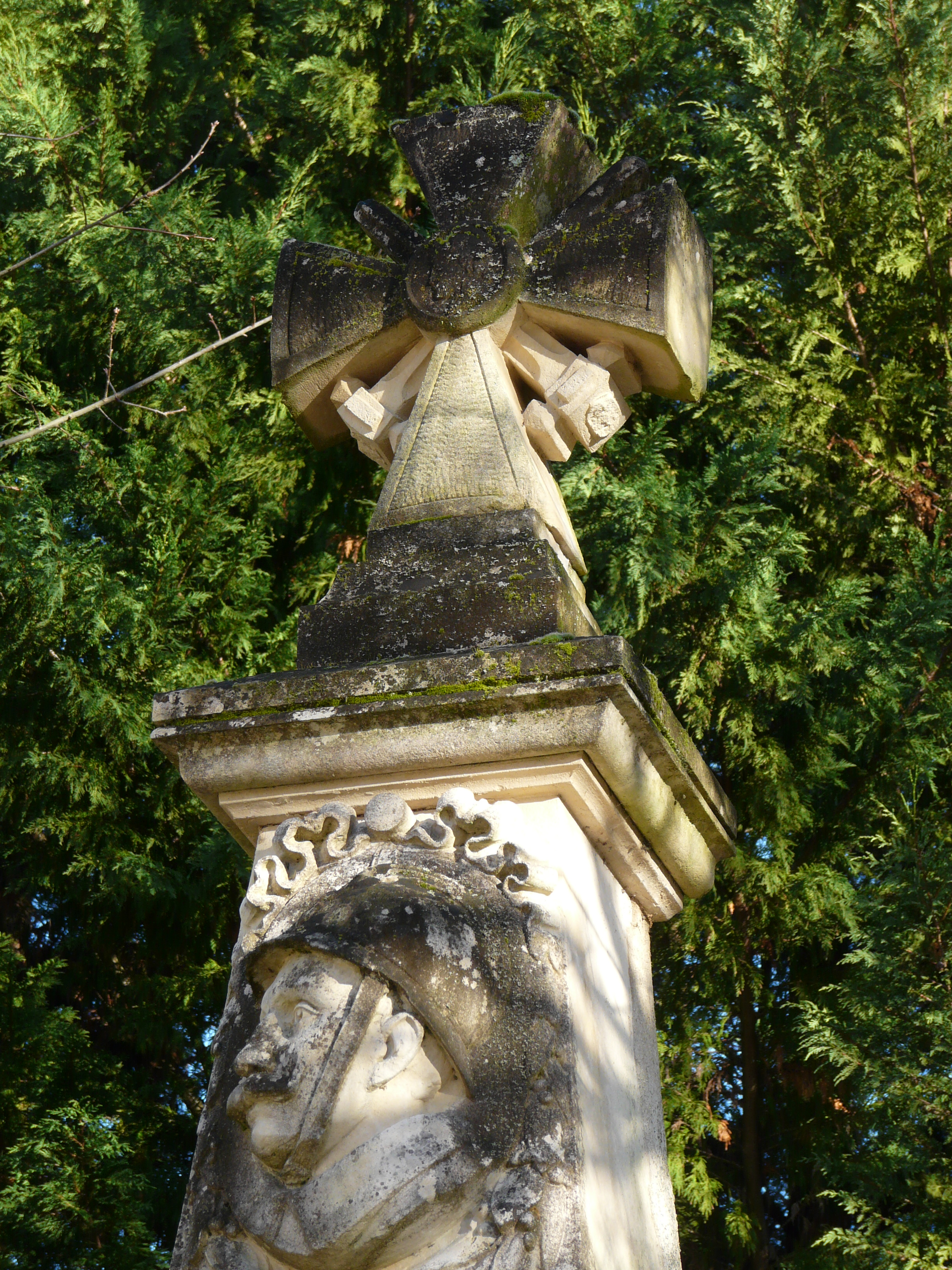 Monument aux morts de Saint-Amand-de-Vergt, Dordogne, France.